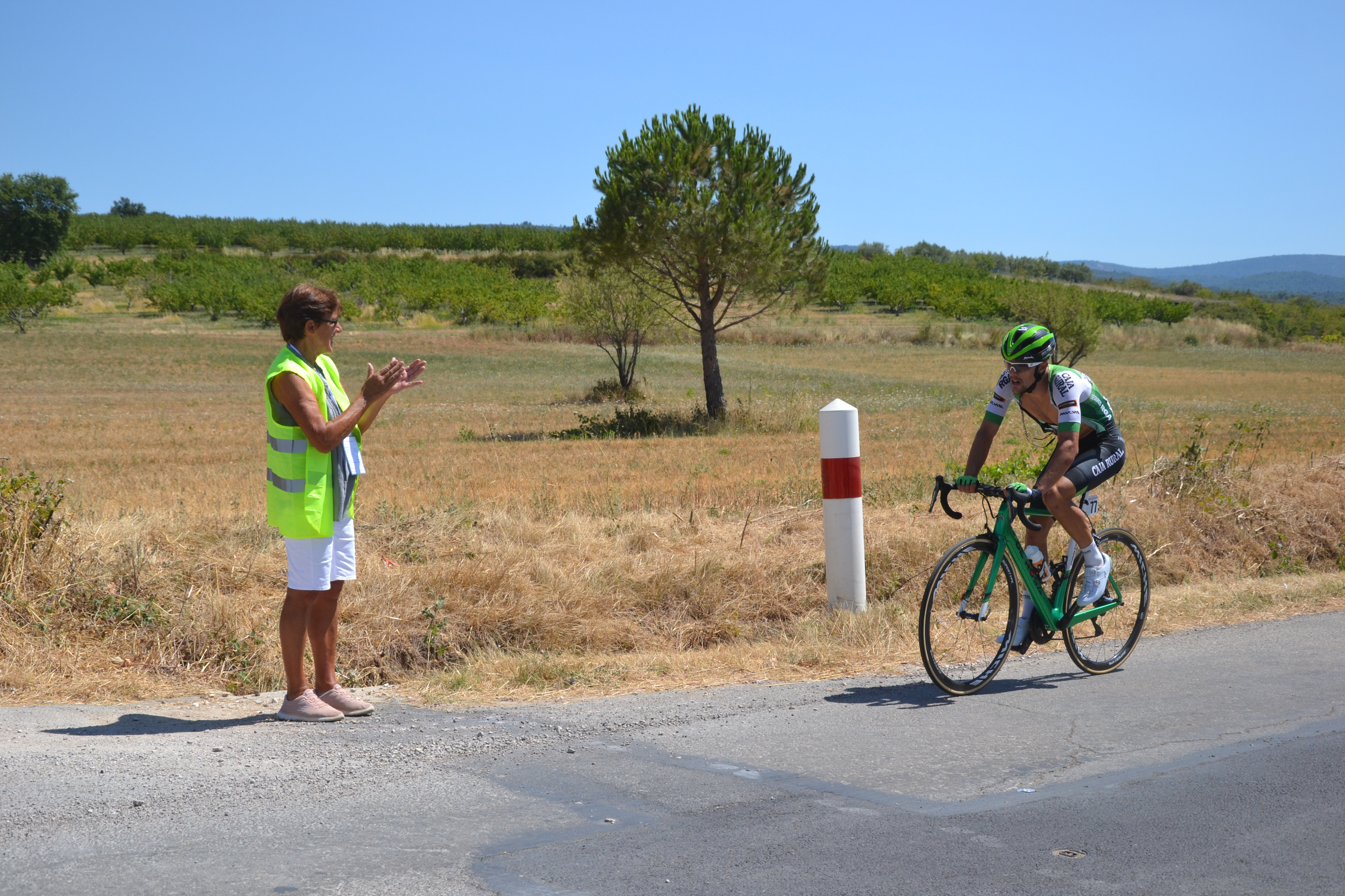 2e passage de la course entre Villes sur Auzon et Flassan